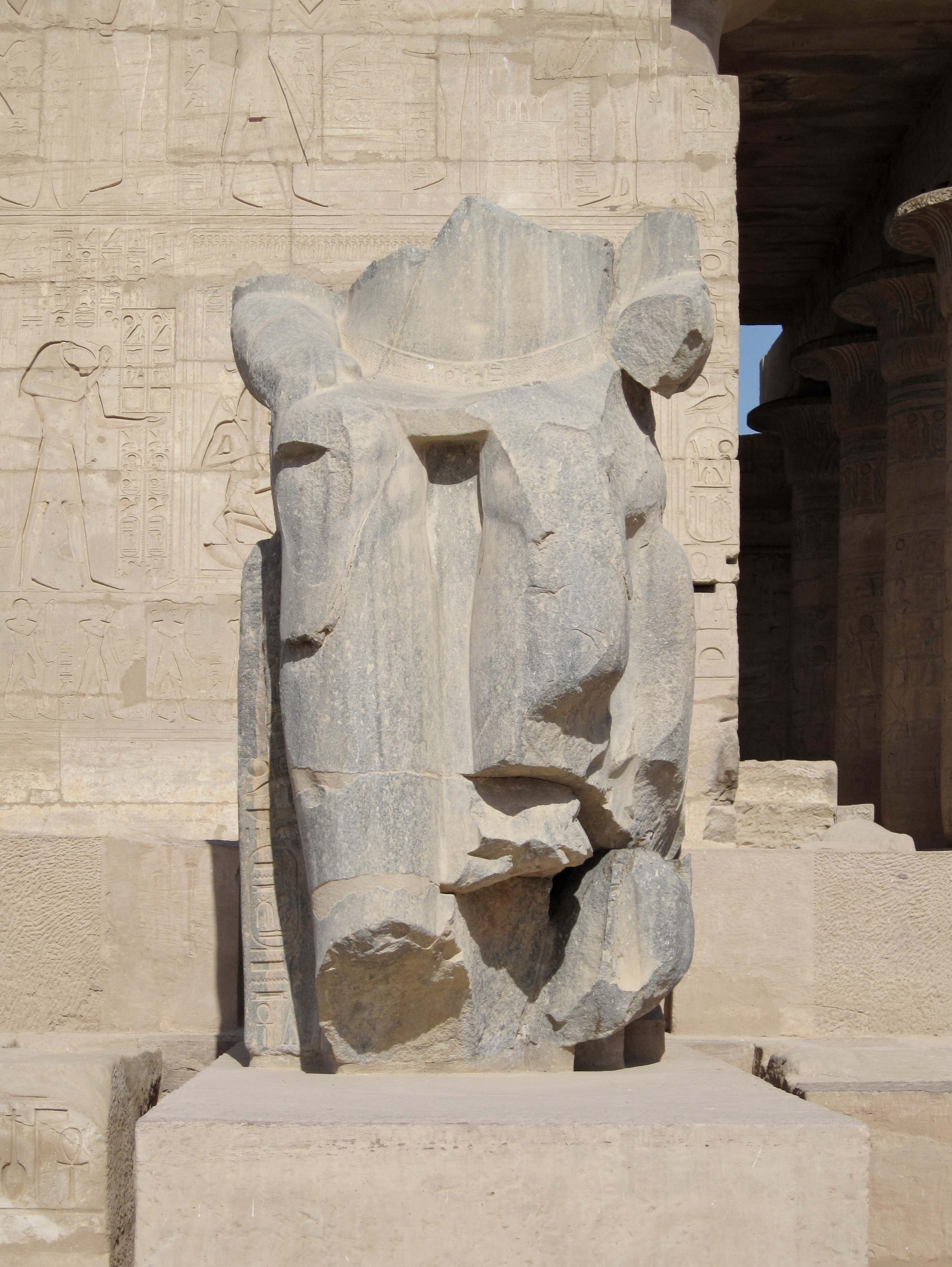 Totentempel des Ramses II. in Theben-West nordwestlich von Luxor, Ägypten